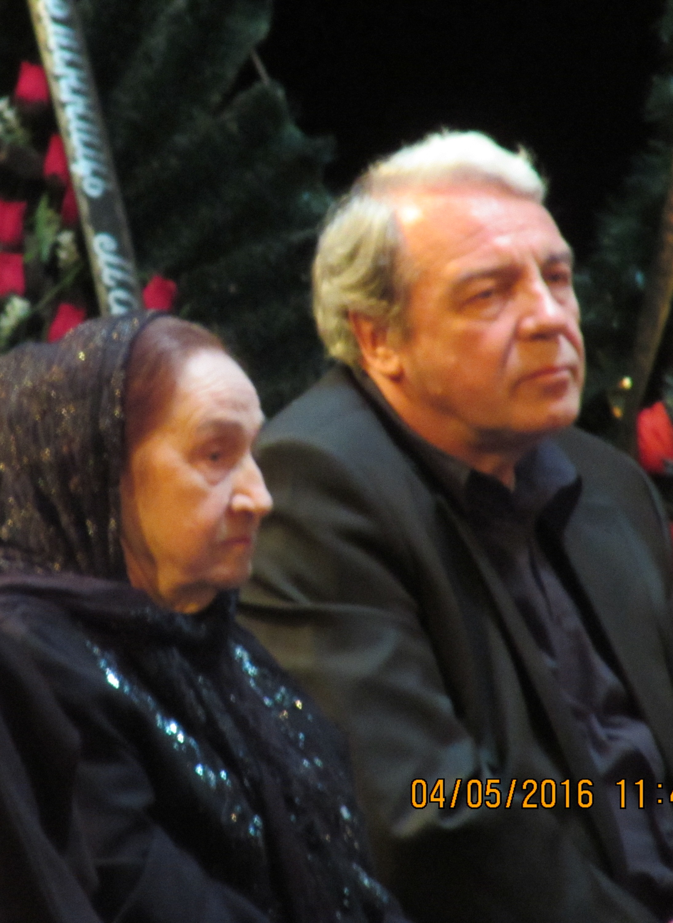 Галина Макарівна та Андрій Дмитрович Гнатюки прощаються з покійним чоловіком та батьком в Національній опері України імені Тараса Шевченка